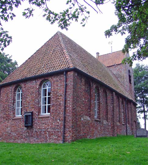 Kerkje op de wierde van Oostum.